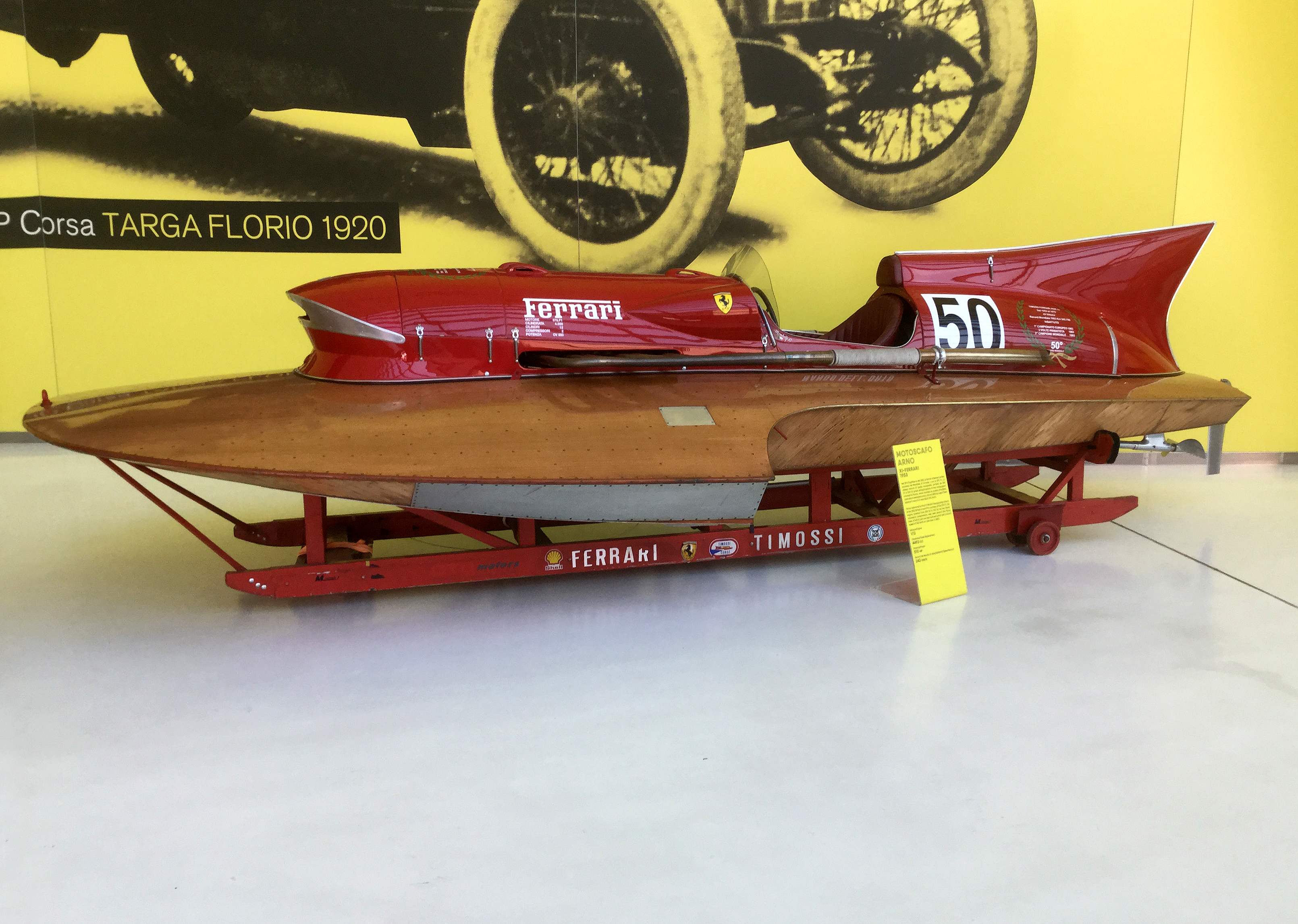 Hydroplan-Motorboot "Ferrari Arno XI"